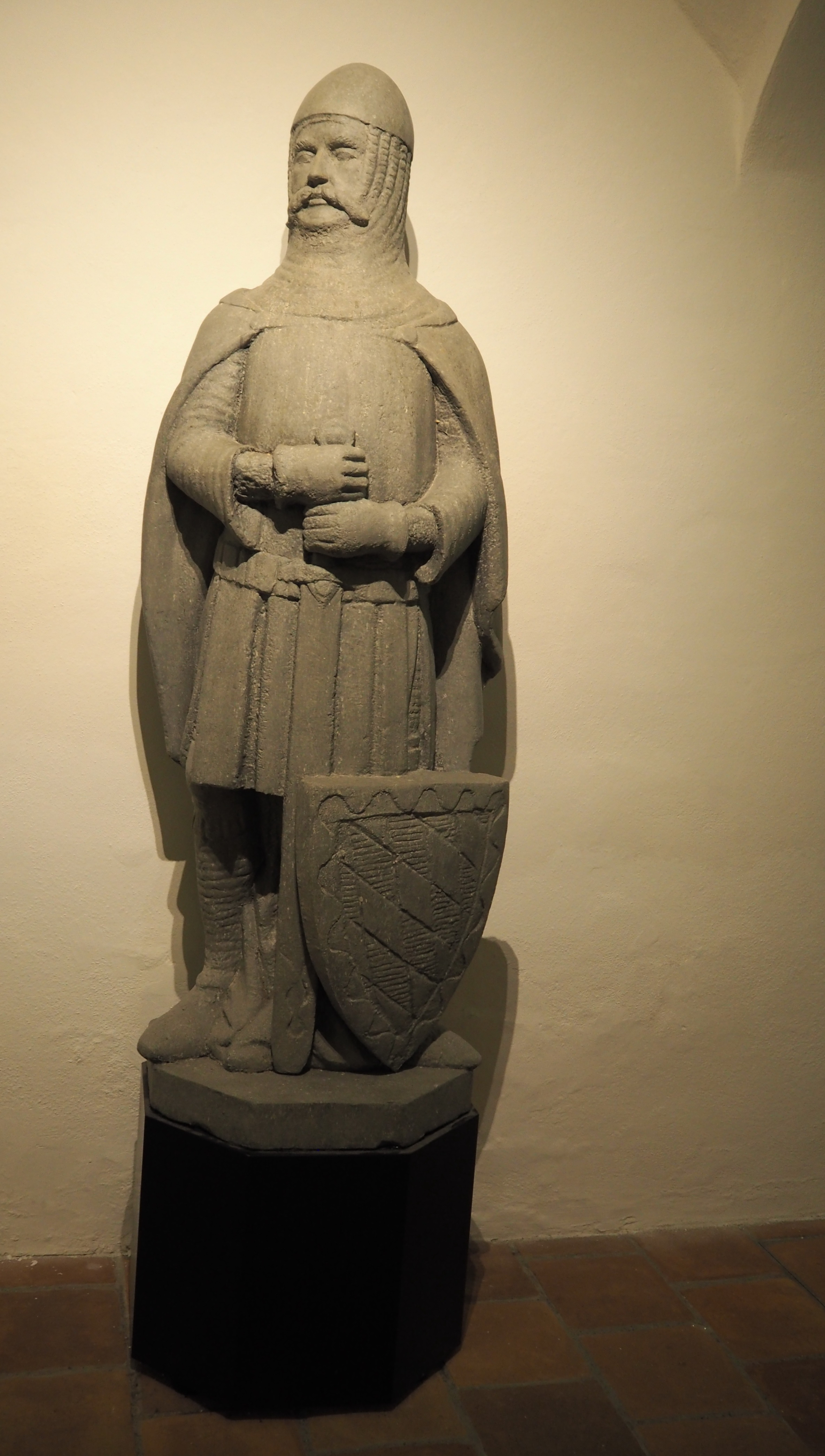 Ausstellung des Museums Münchner Kaiserburg im Alten Hof, Steinbildnis von Ludwig II dem Strengen